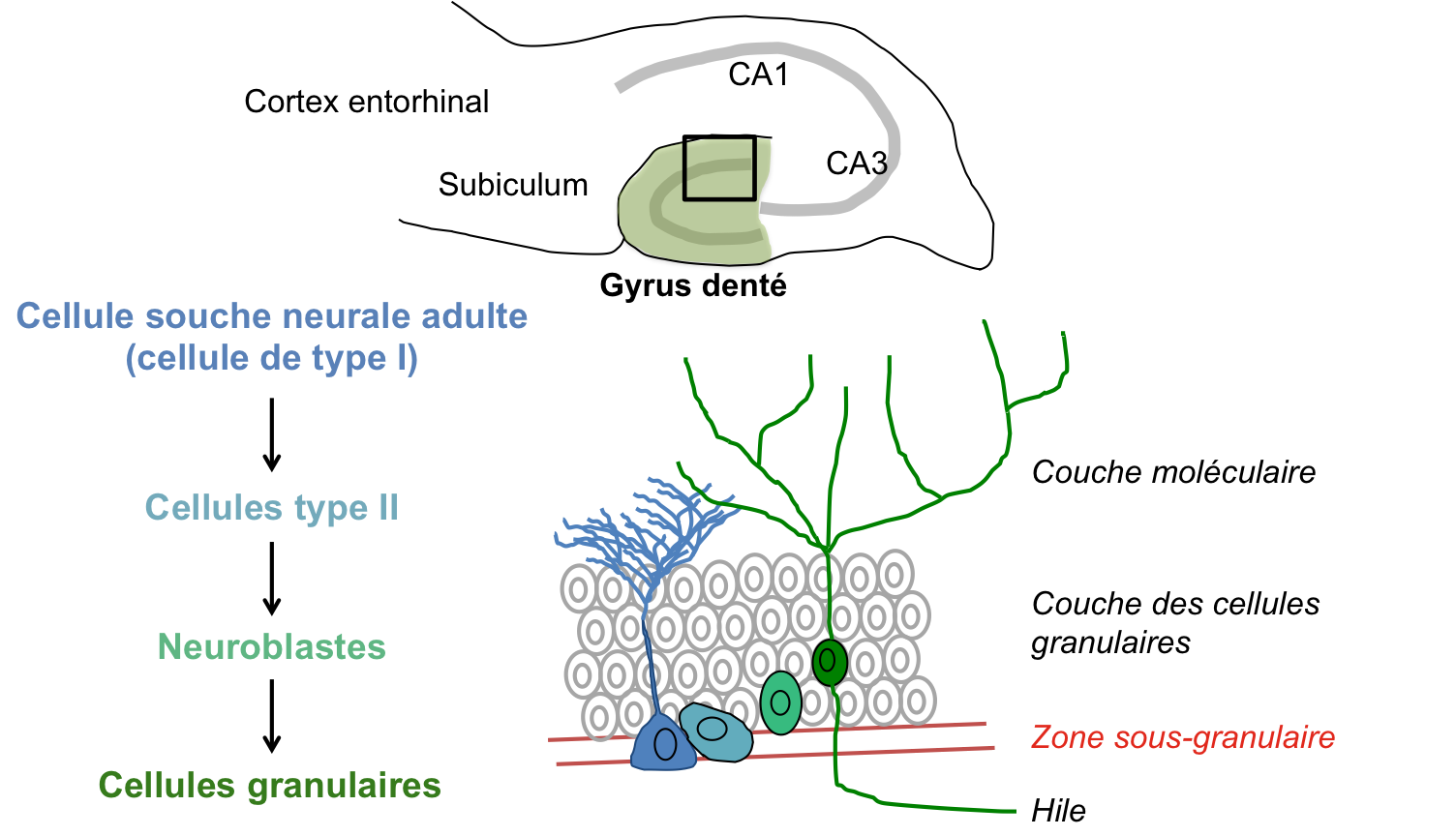 Localisation du gyrus denté en haut, étape de la neurogenèse à gauche et morphologie schématique des cellules à droite